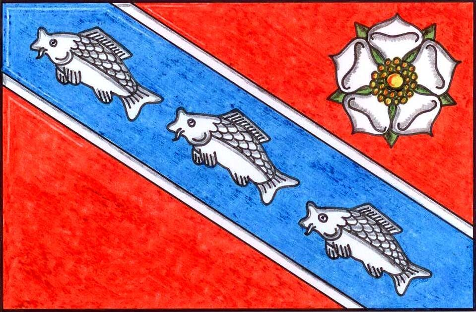 Česky: vlajka obce Žár